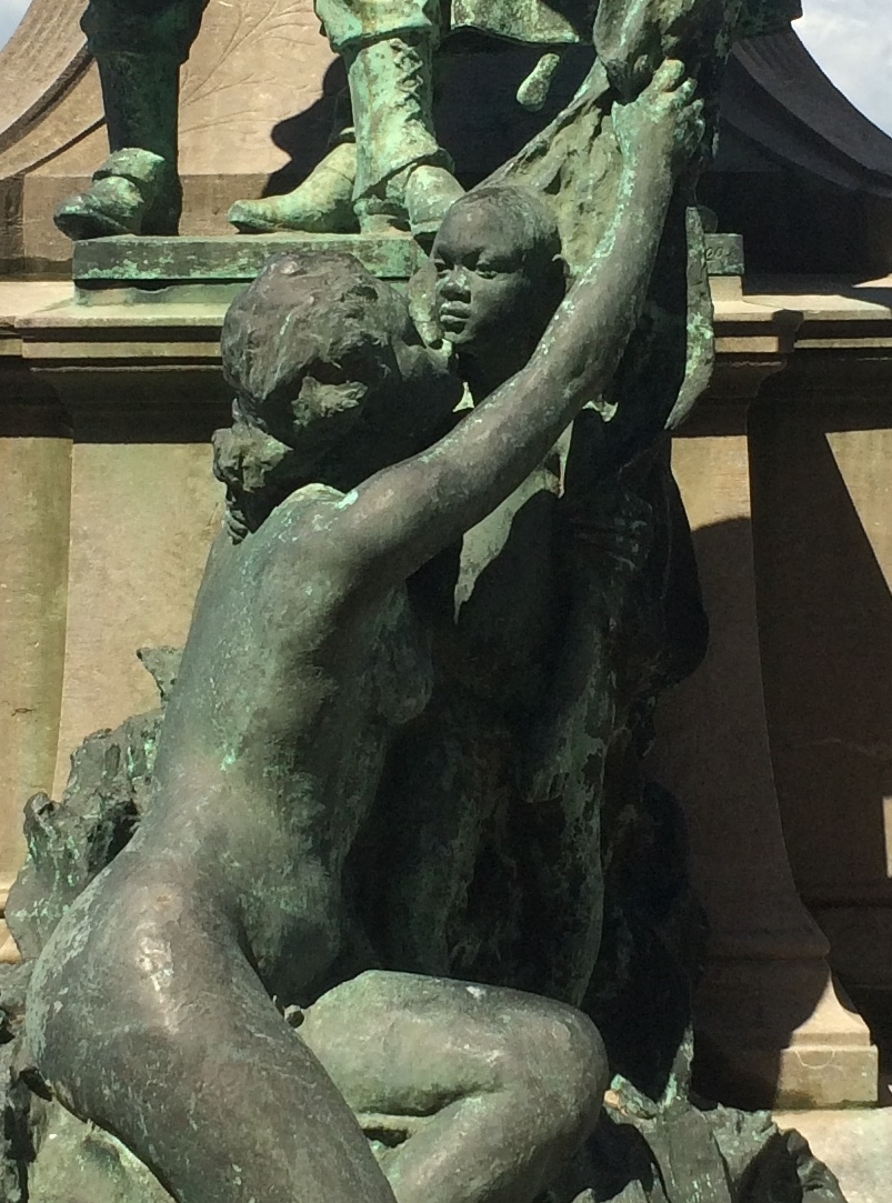 Standbeeld Lippens en De Bruyne